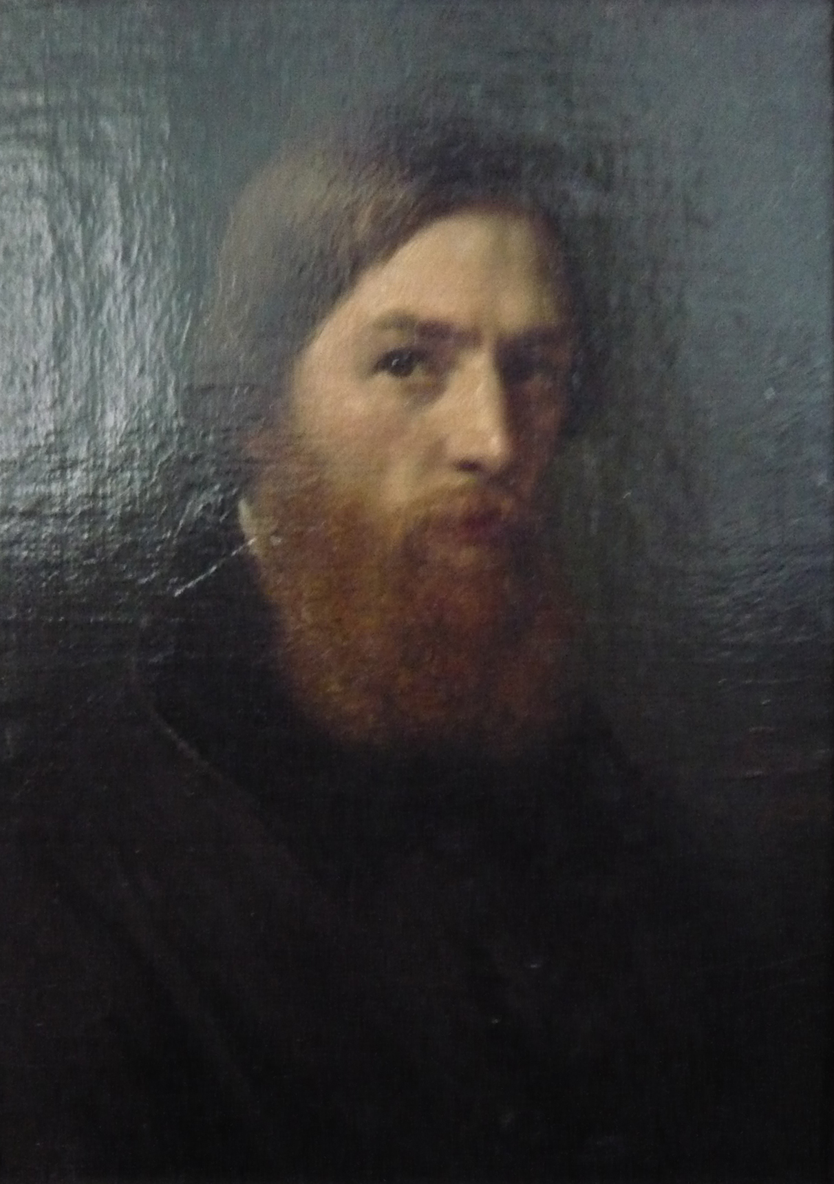 16 A. Weber - Porträt August Weber (1817–1873) - in Freundschaftsgalerie von Einzelbildnissen der Düsseldorfer Malerschüler und ihren Freunden (Vermächtnis des Künstlers)